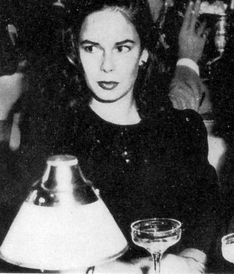 Ona O'neill